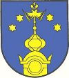 Wappen der Gemeinde Frauental an der Lassnitz